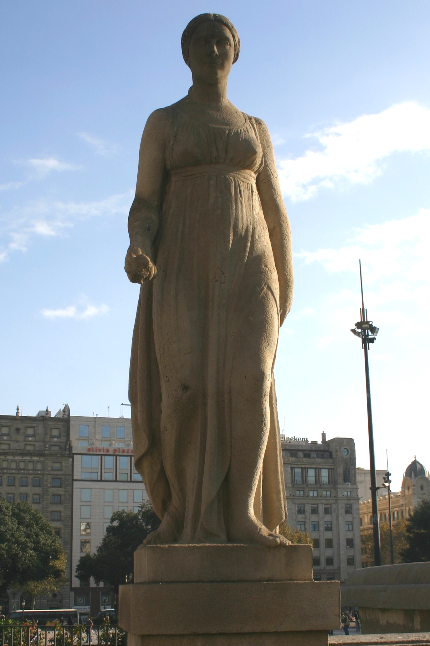 Noia. Plaza Catalunya. Barcelona (Spain)